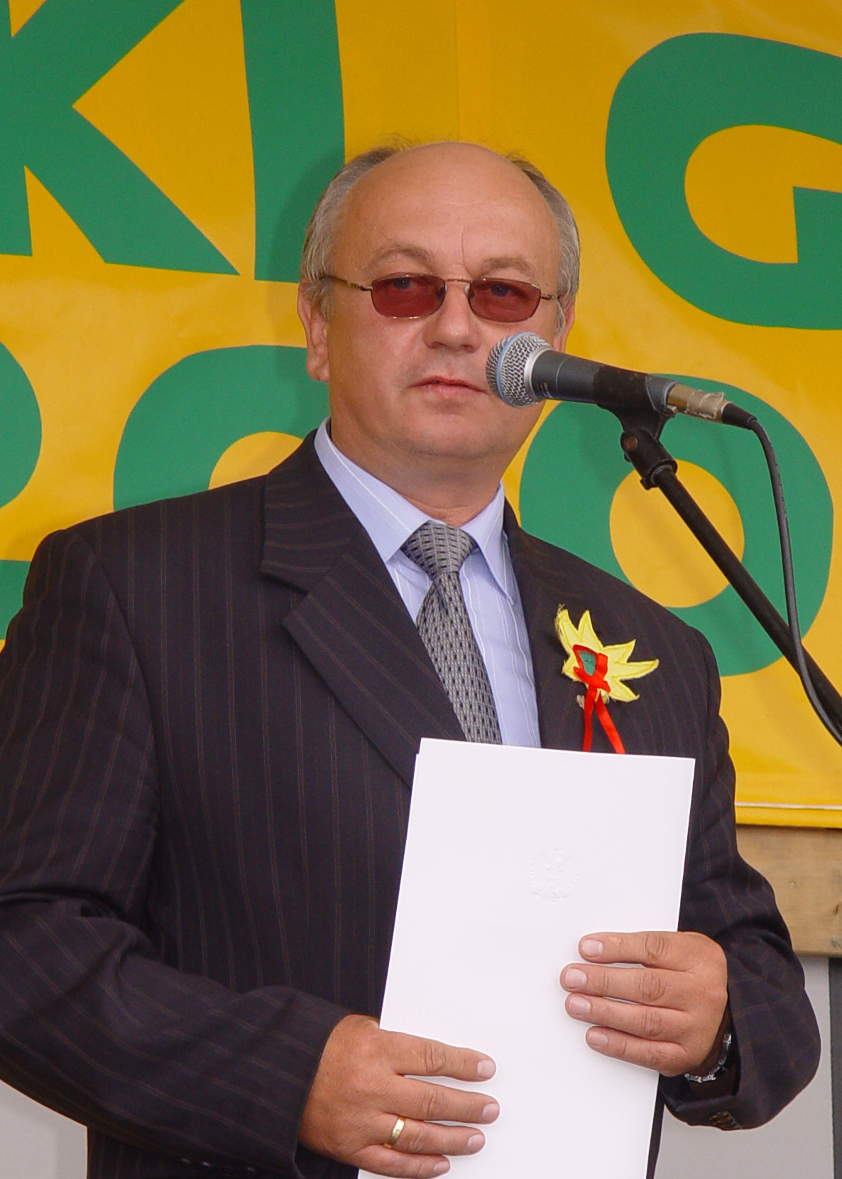 Józef Cepil, poseł świętokrzyski, gość dożynek w Nowym Folwarku, 2 września 2007r.